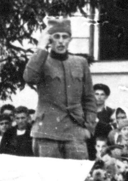 Srpski (latinica): Slobodan Sekulić (1915-1942), srpski partizanski komandant i značajna ličnost ustaničke Srbije, odaje poštu izginulim borcima u Užicu 2.X. 1941 godine.